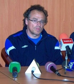 Берхард Липперт - гл.тренер Молодежной сборной Азербайджана